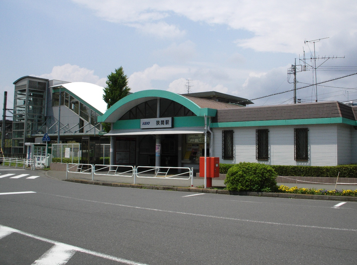 狭間駅